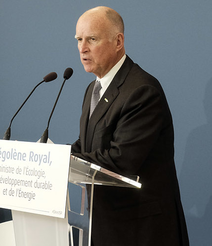 Discours avant la signature d'un accord pour la croissance verte